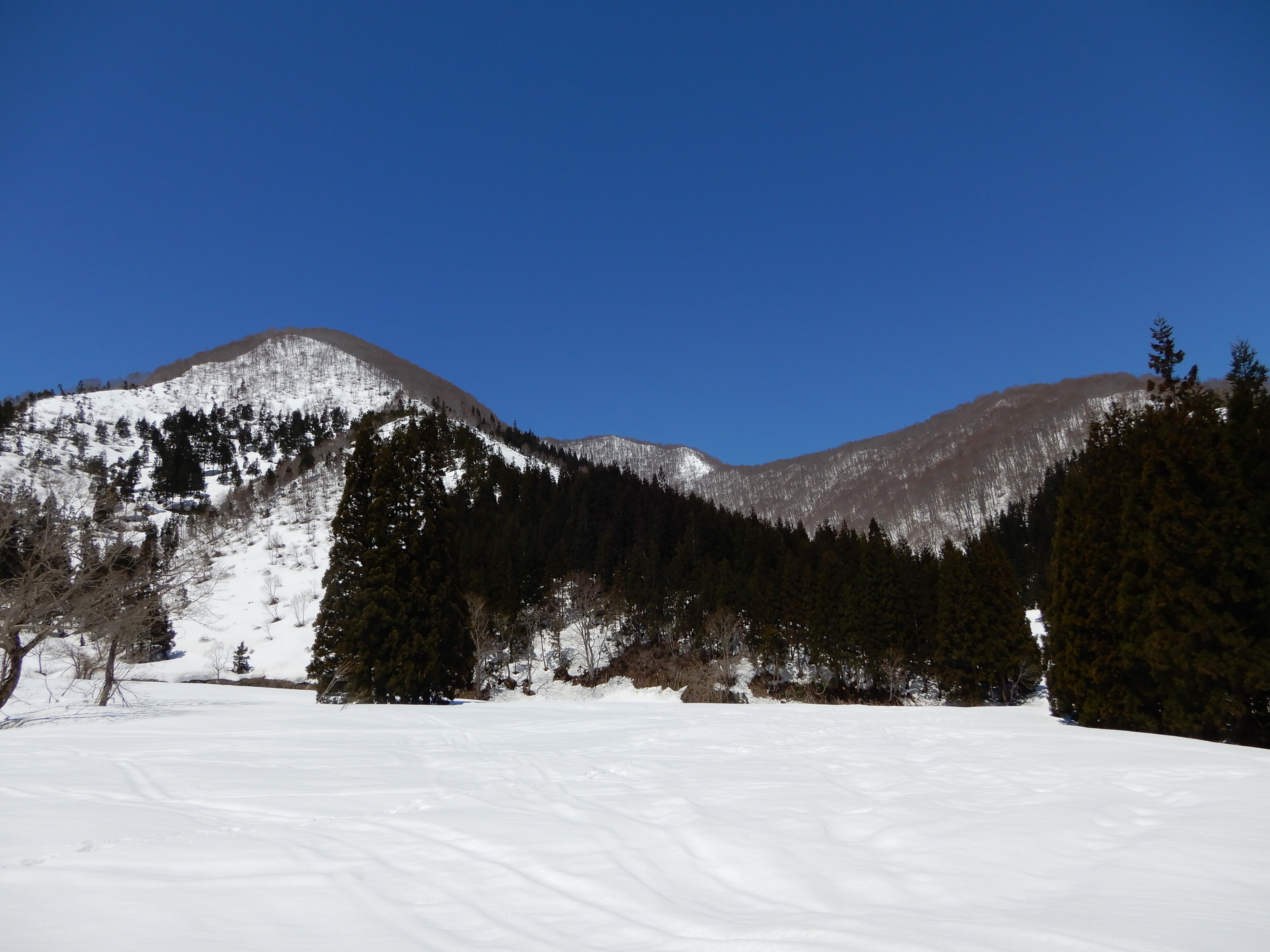 西谷後沢より（2019.04.13）